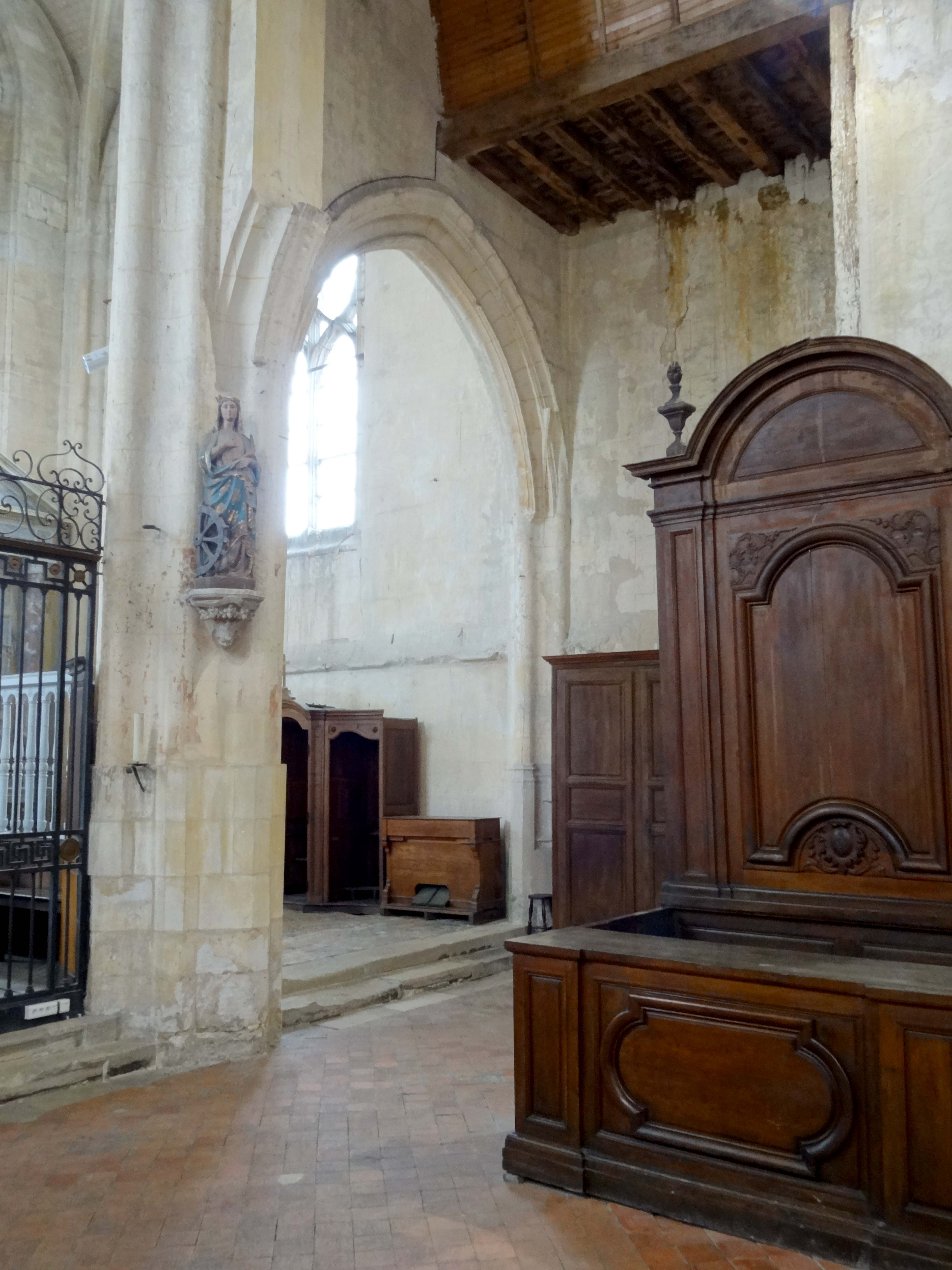 Intérieur de l'église - voir titre.